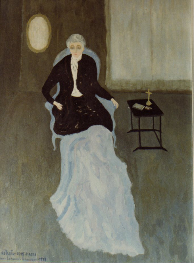 00 oleo sobre tela